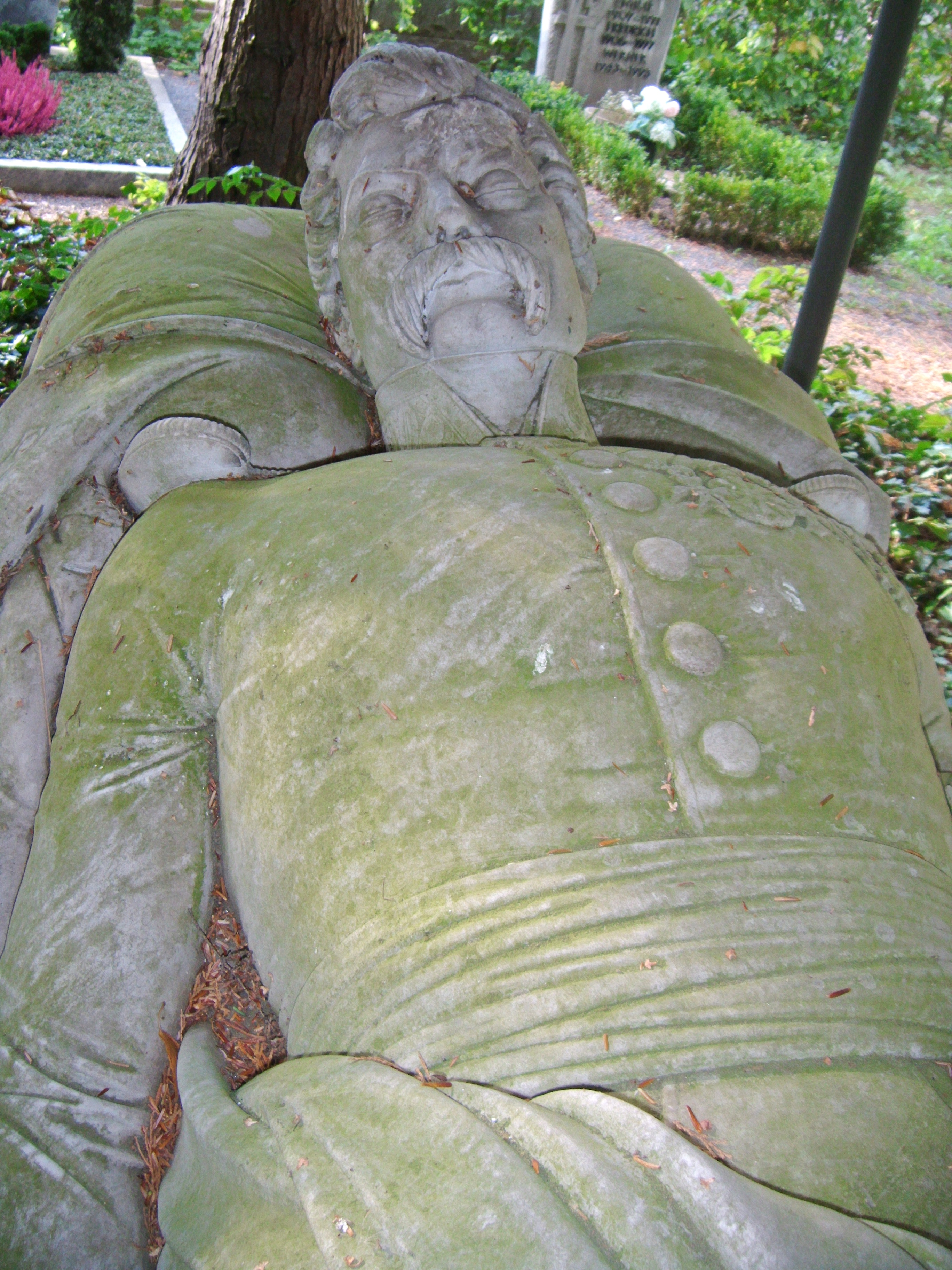 Karl Freiherr von Pflummern (1787-1850), Bayerischer Generalmajor und Festungskommandant von Landau (Pfalz), Portrait von seinem Grabmal, Friedhof Landau